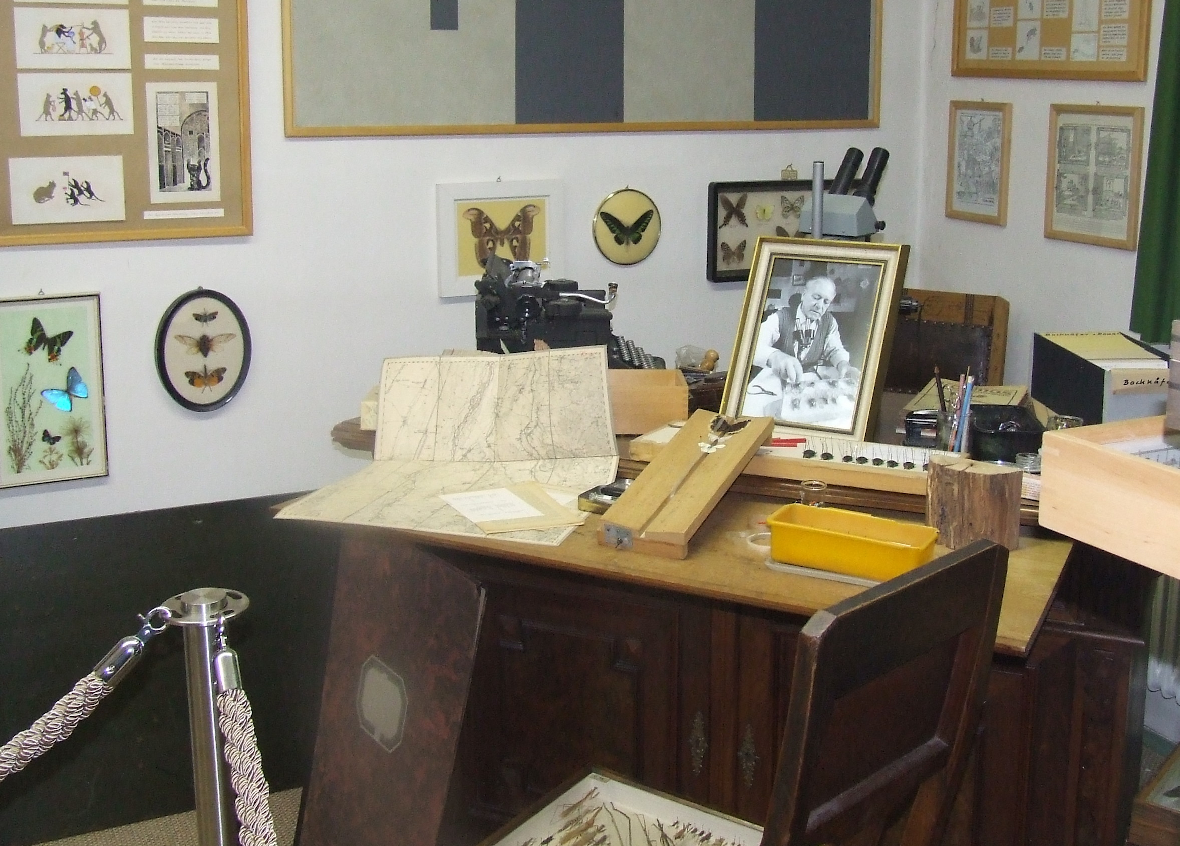 Arbeitszimmer des Naturforschers Heinz Fischer im Naturmuseum Königsbrunn.